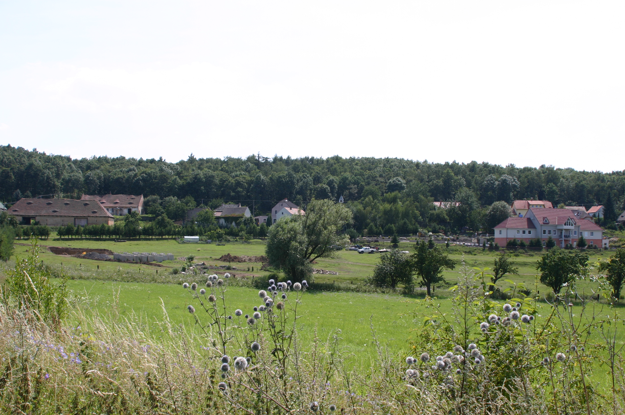 Osada Kaňkov u obce Braňany v okrese Most.